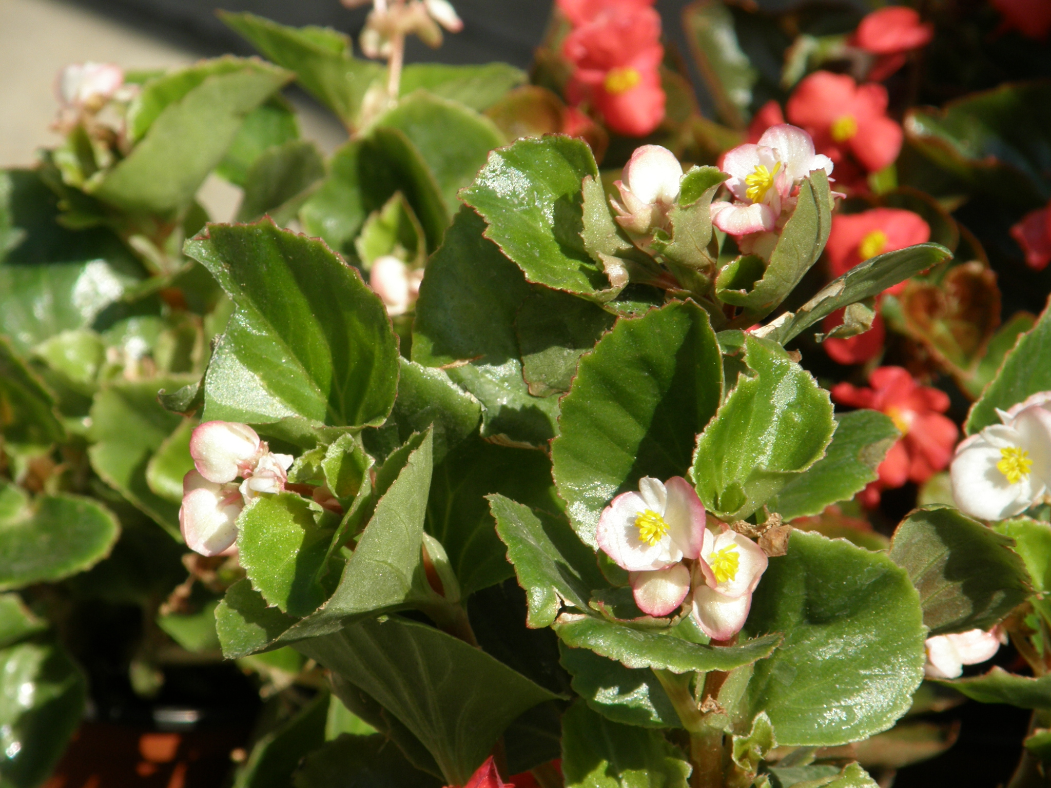 Донецк. Празднование дня города и дня шахтёра. Выставка цветов